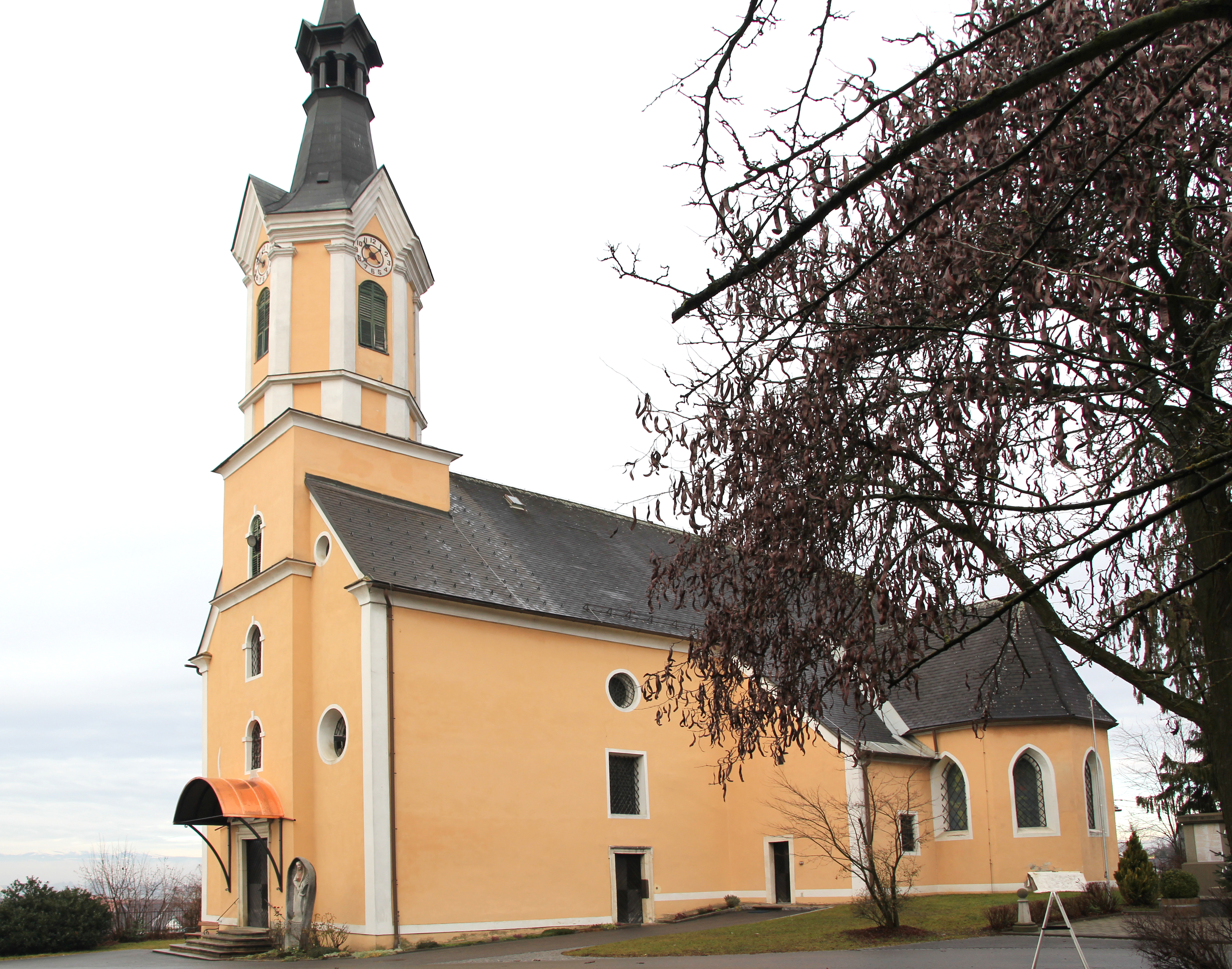 Aussenansicht von südosten